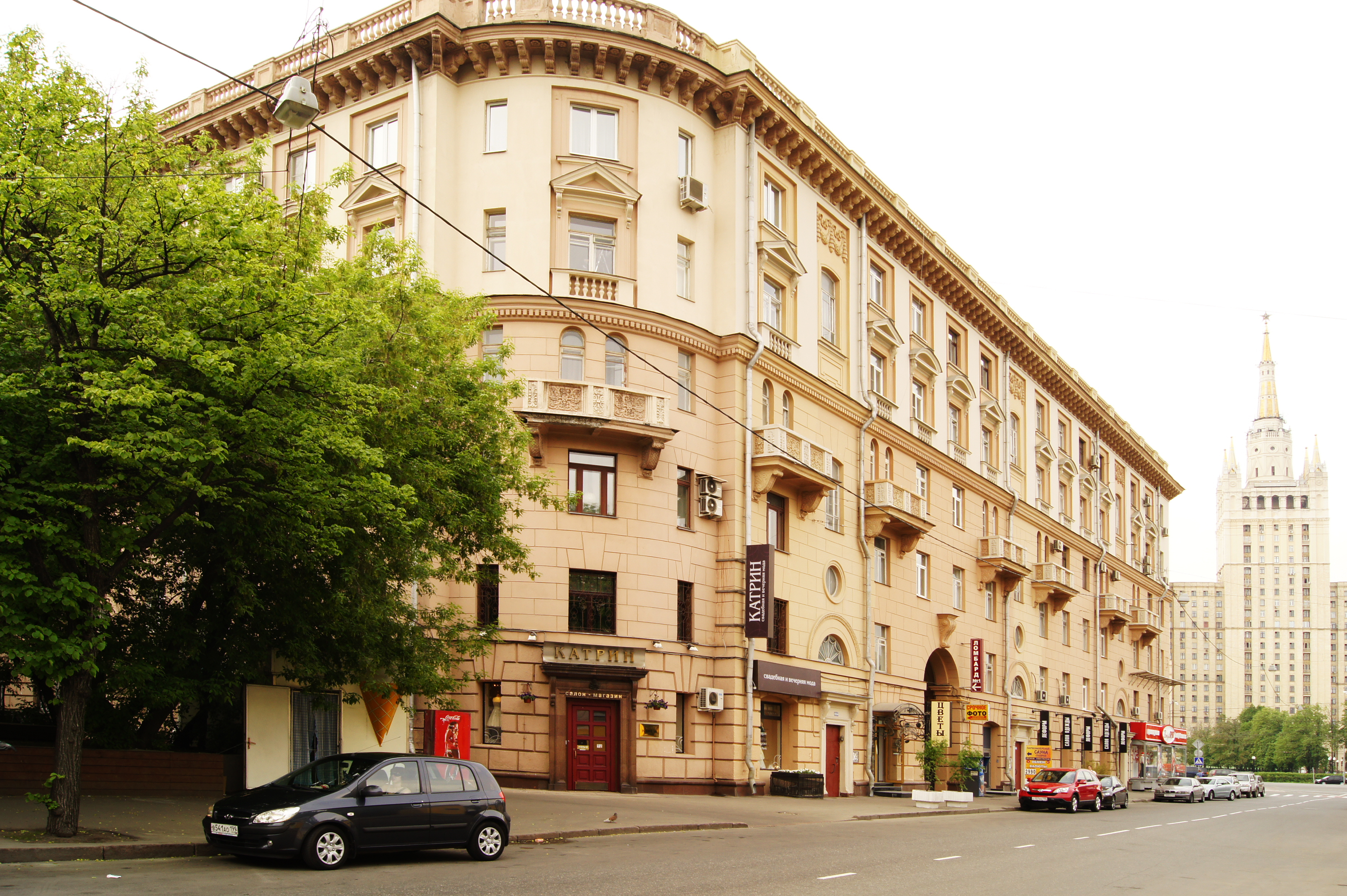 Povarskaya Street 35/28